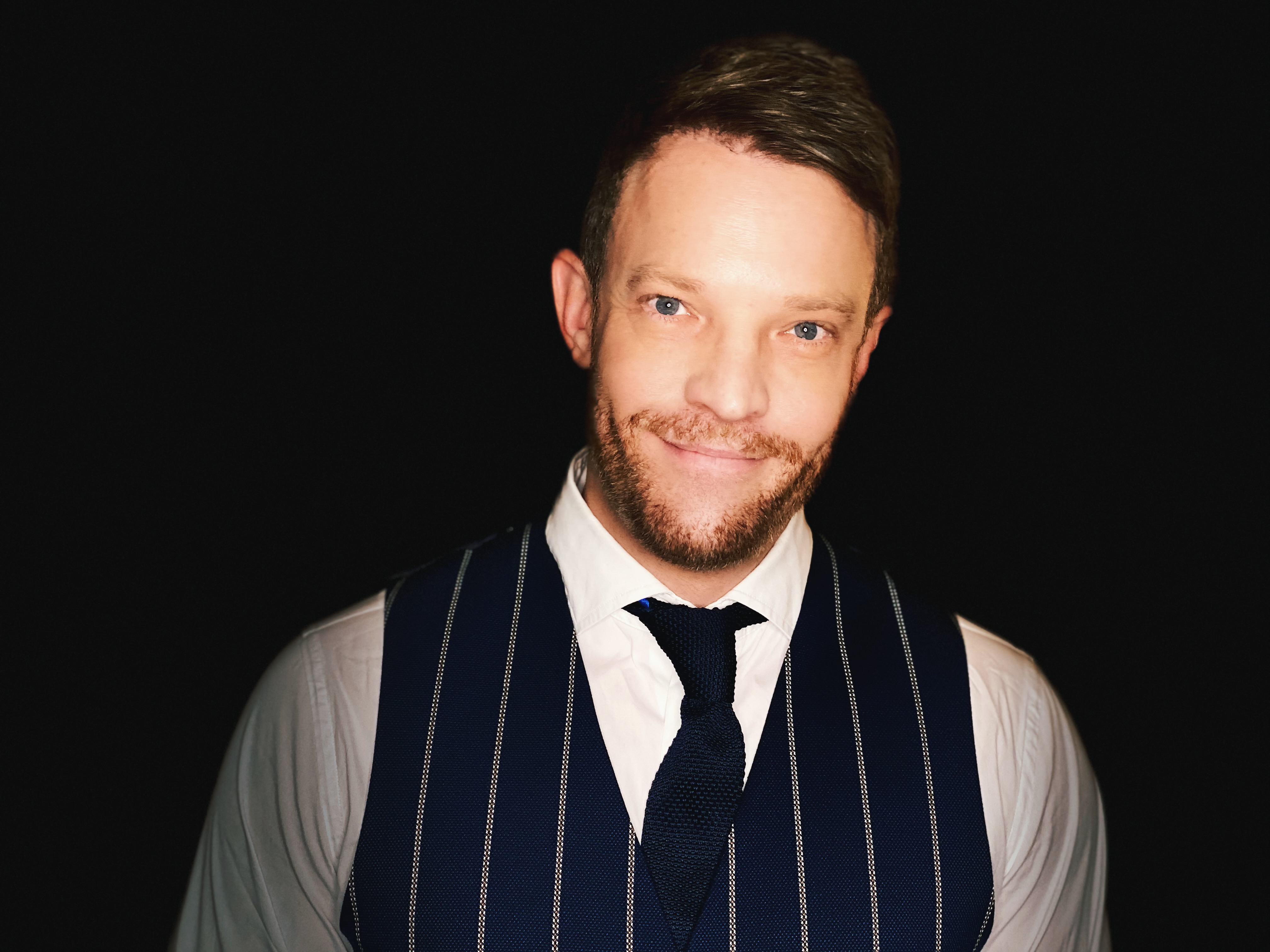 Porträt des Moderators und Autors Ernst-Marcus Thomas